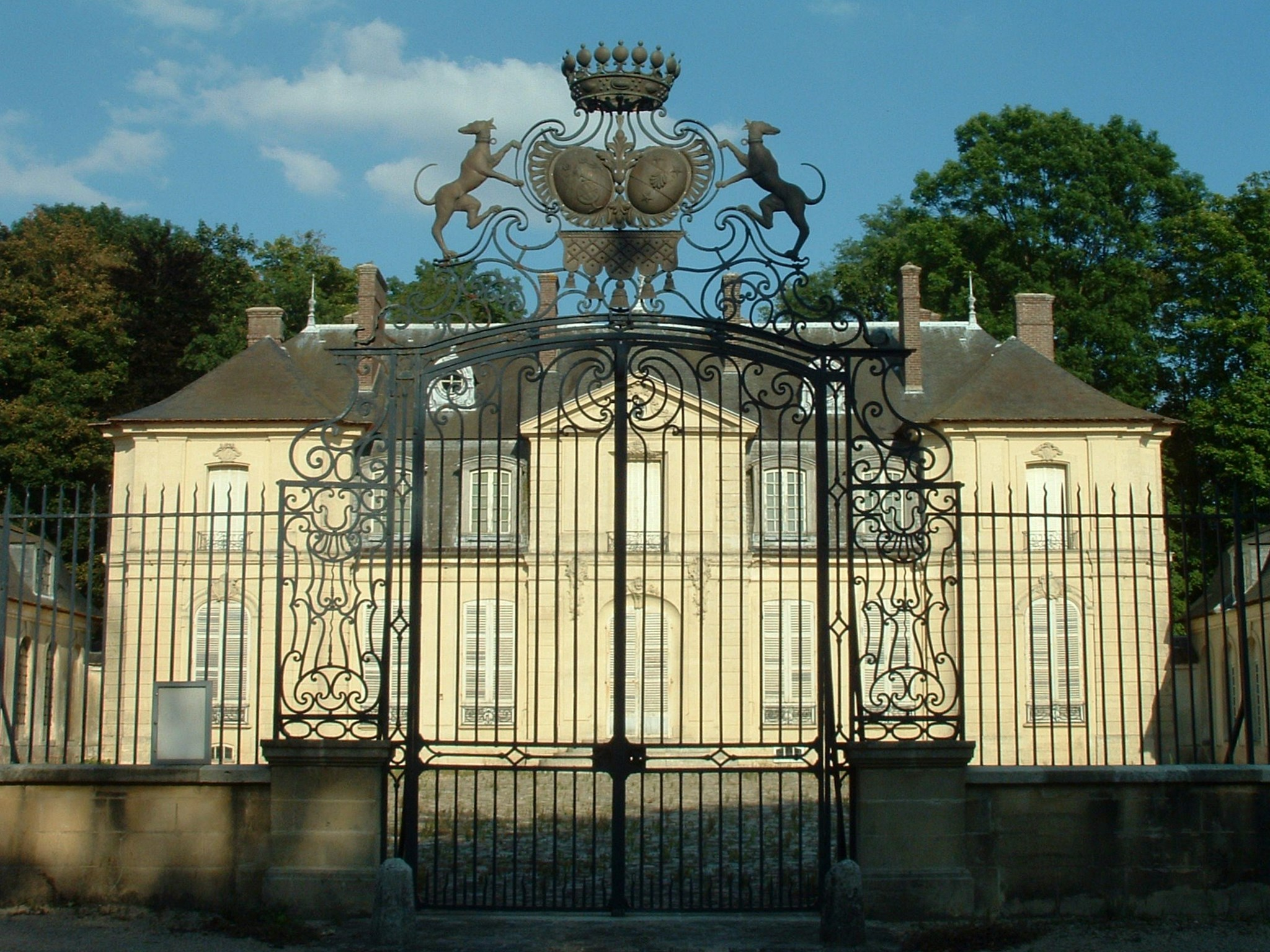 Château de Jossigny